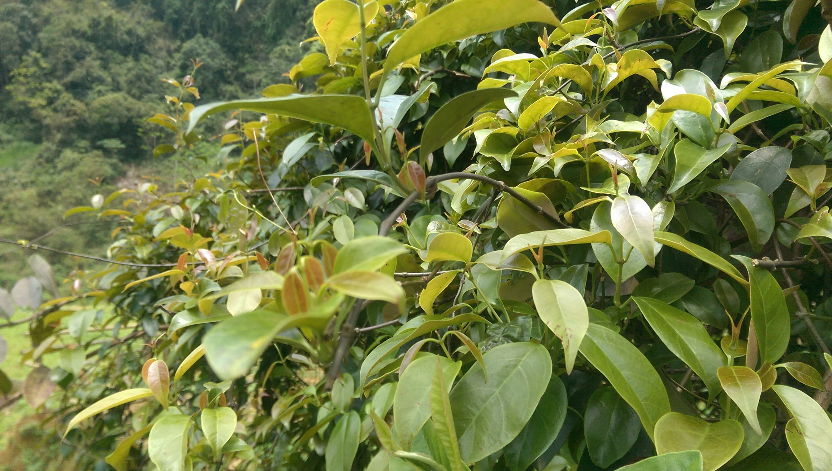 Cây Lá giang (Aganonerion polymorphum), mọc ở Thanh Hóa.